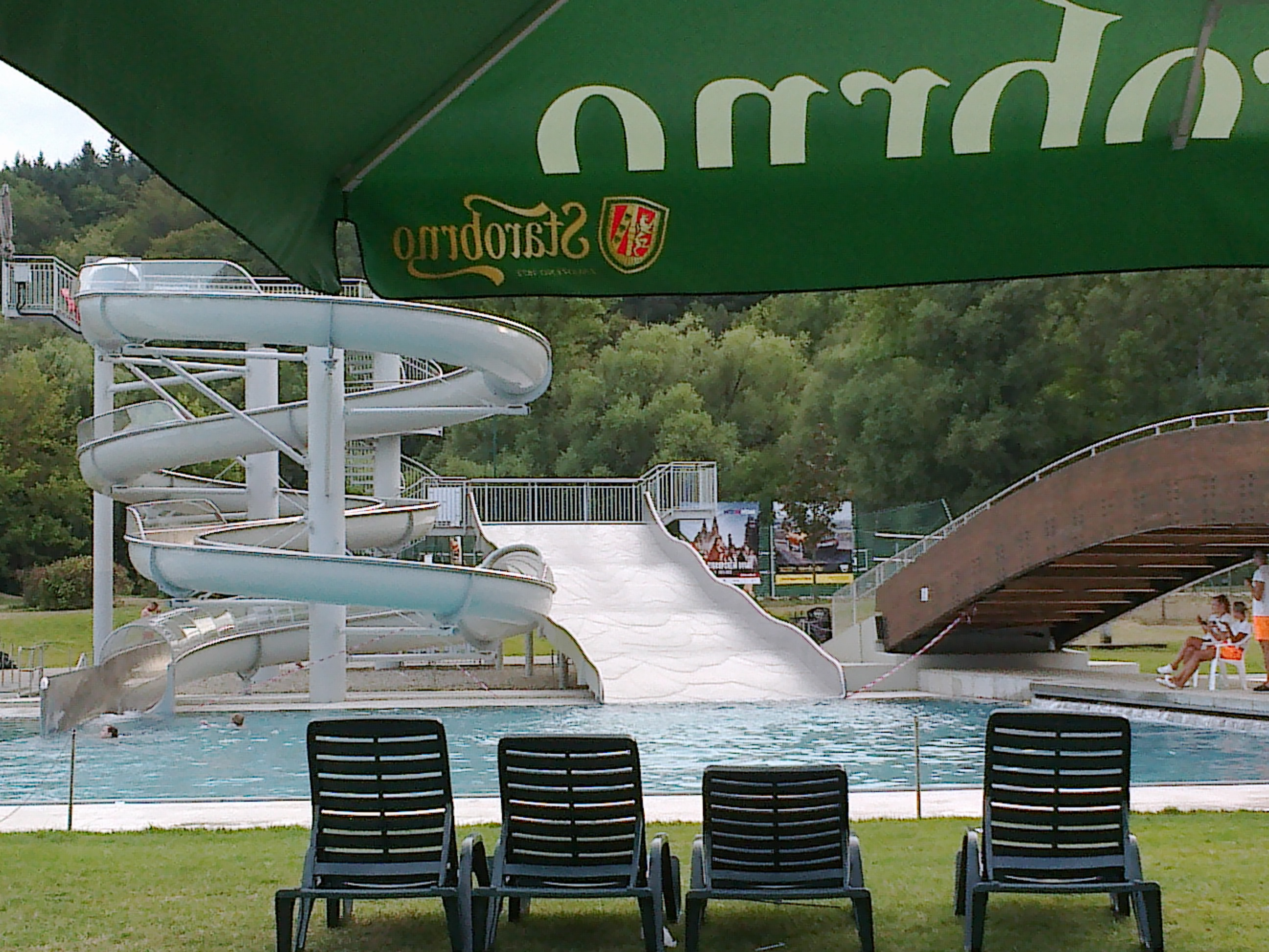 Koupaliště Riviéra (Brno) - prostřední bazén s tobogánem a skluzavkou.